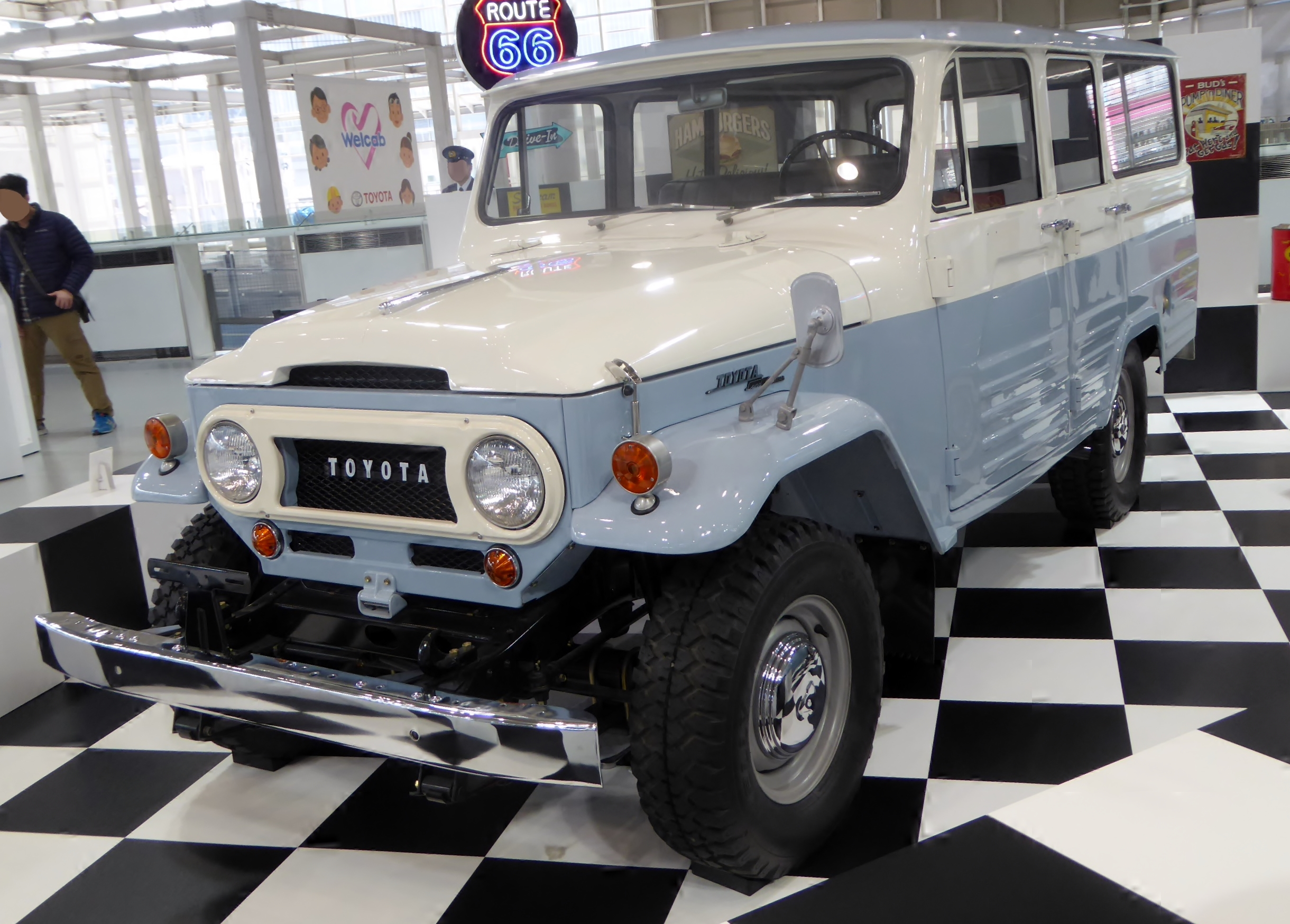 米国版J40型トヨタ・ランドクルーザーをフロントから撮影。